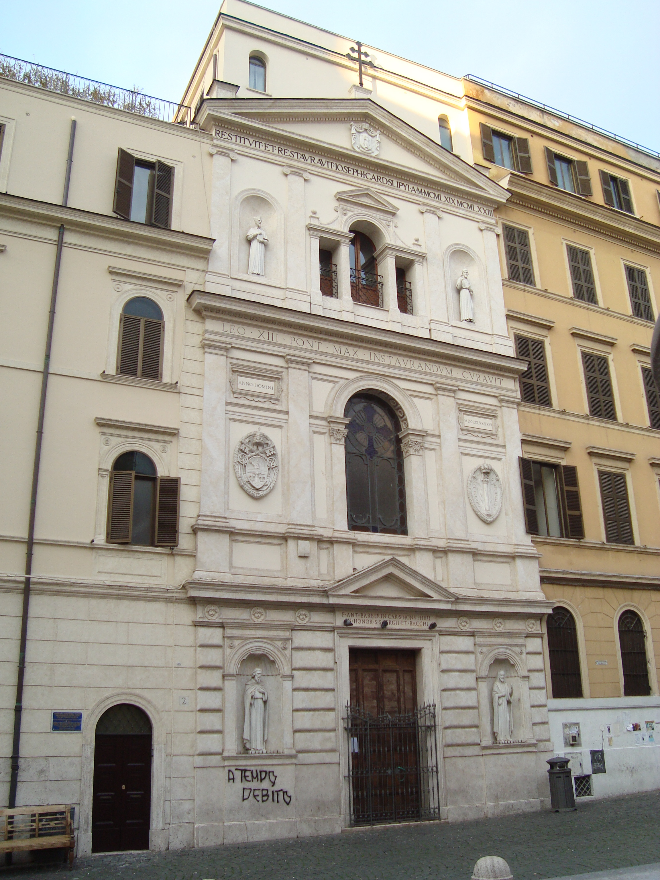 L'Eglise Santi Sergio e Bacco degli Ucraini de la piazza Madonna dei Monti dans le rione de Monti à Rome